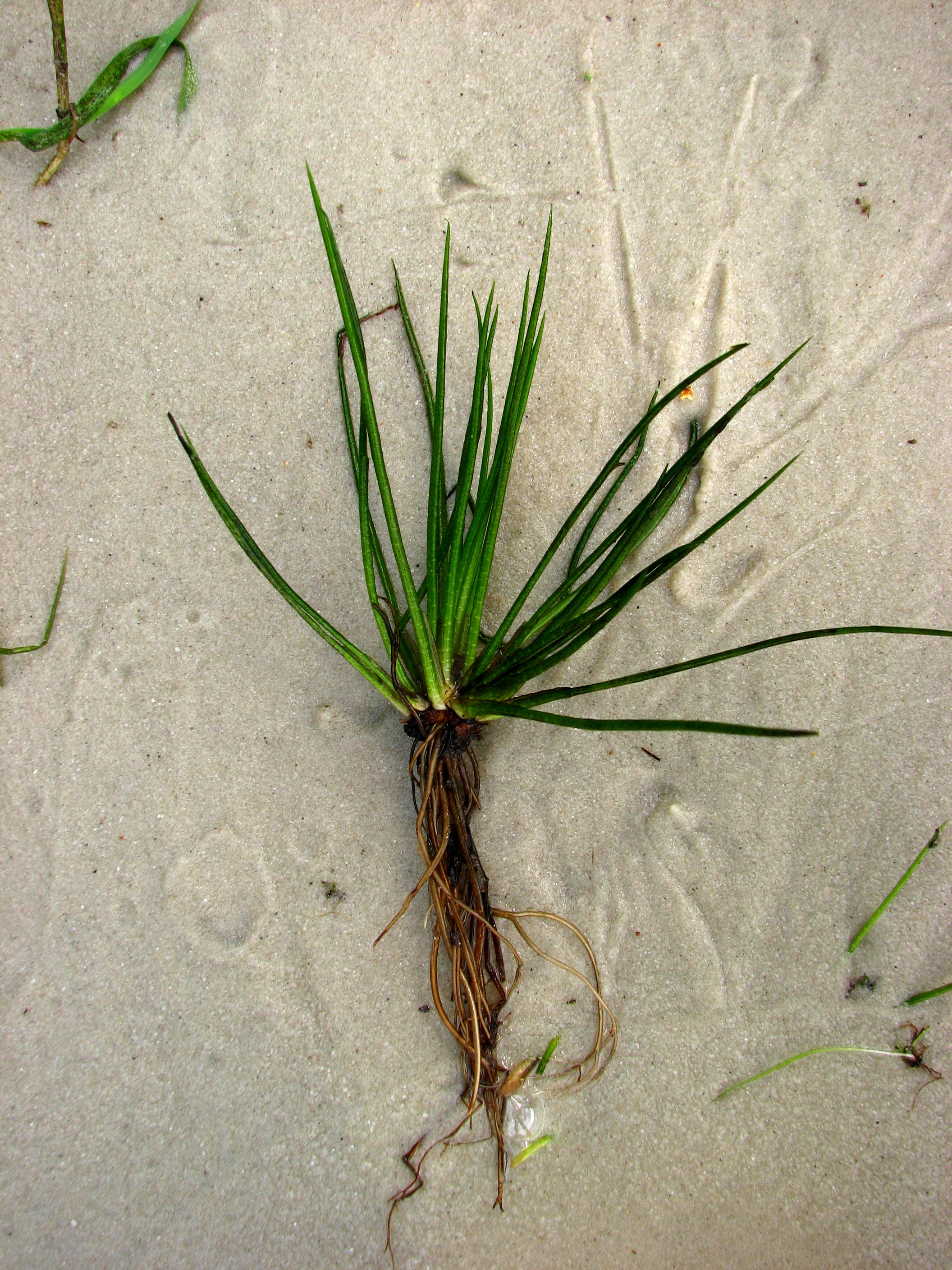 Молодильник озерний (ЧКУ) в Рівненському заповіднику (Білоозерський масив)